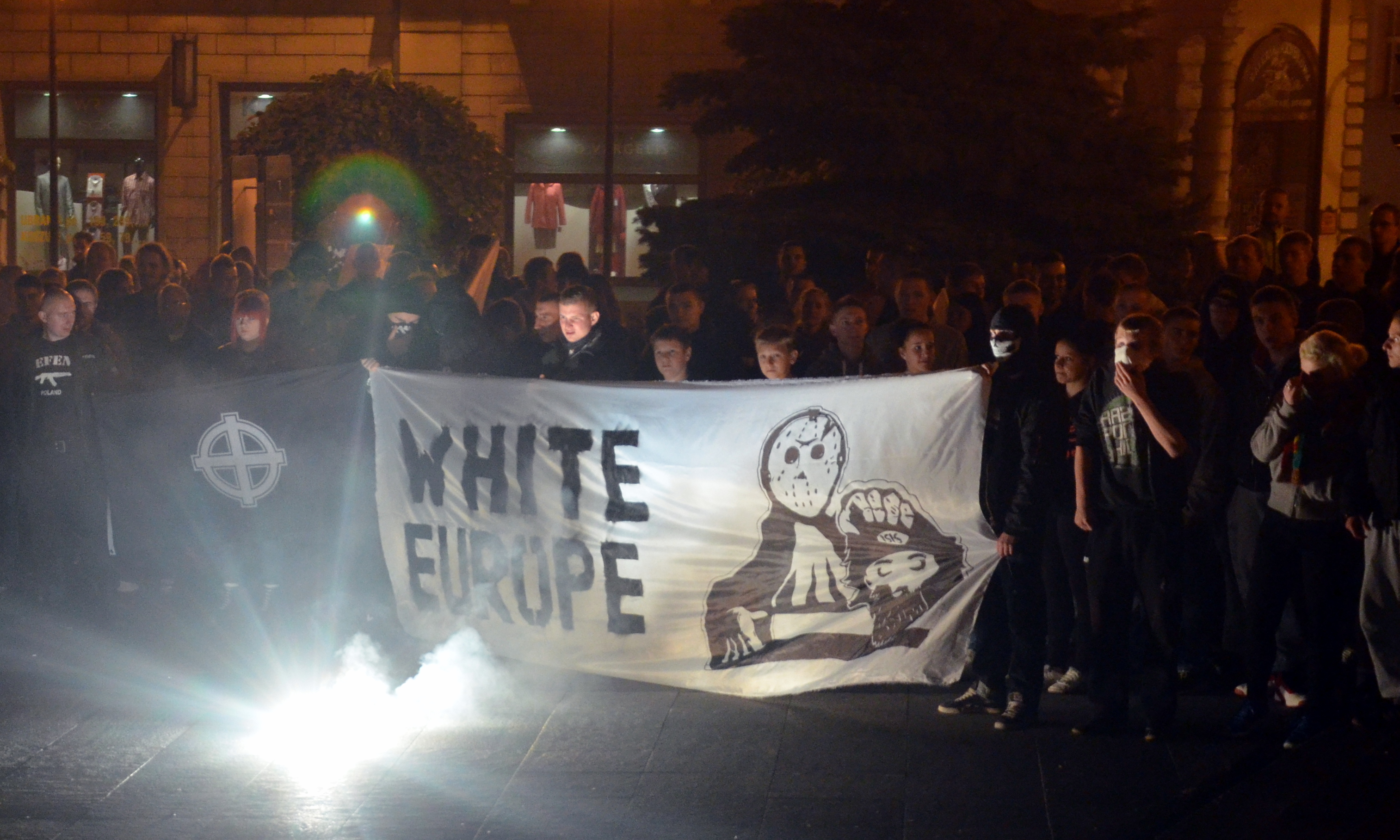 Der anti-islamische Protest in Polen